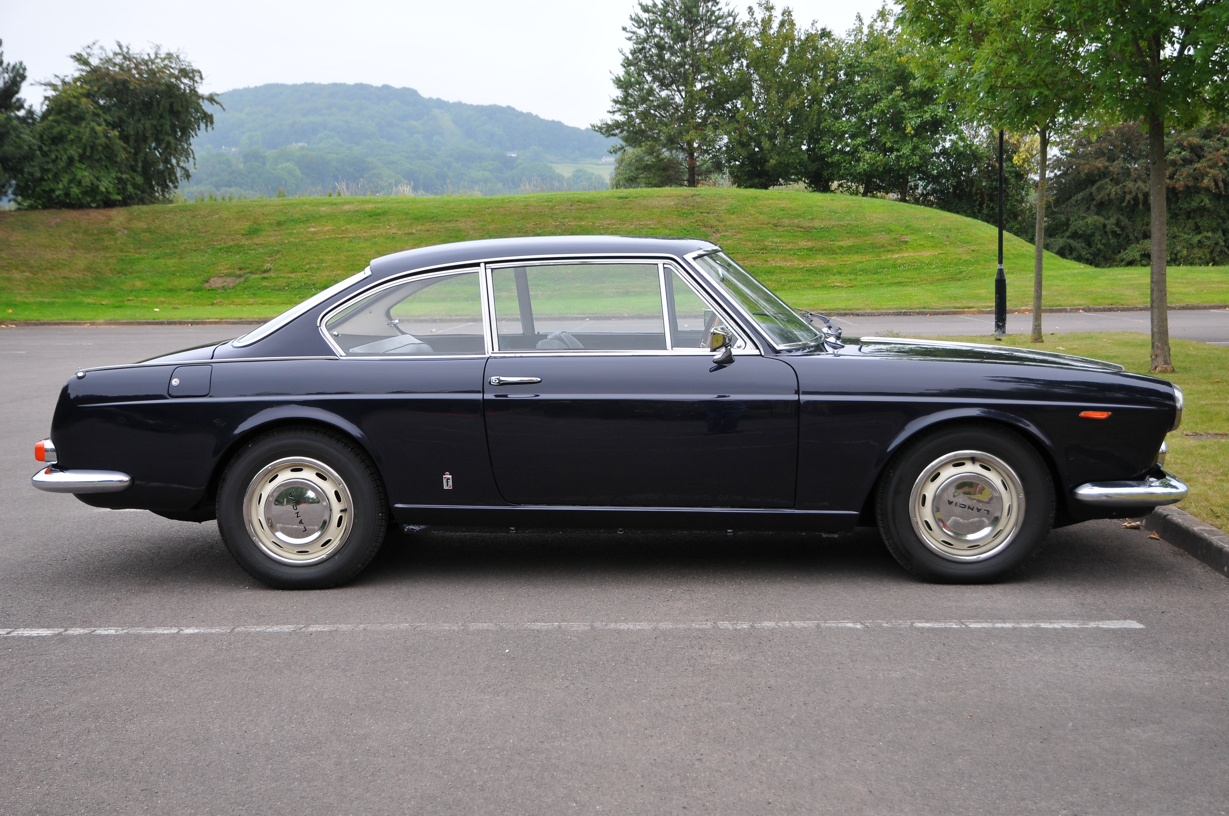 Lancia Motor Club AGM 2011